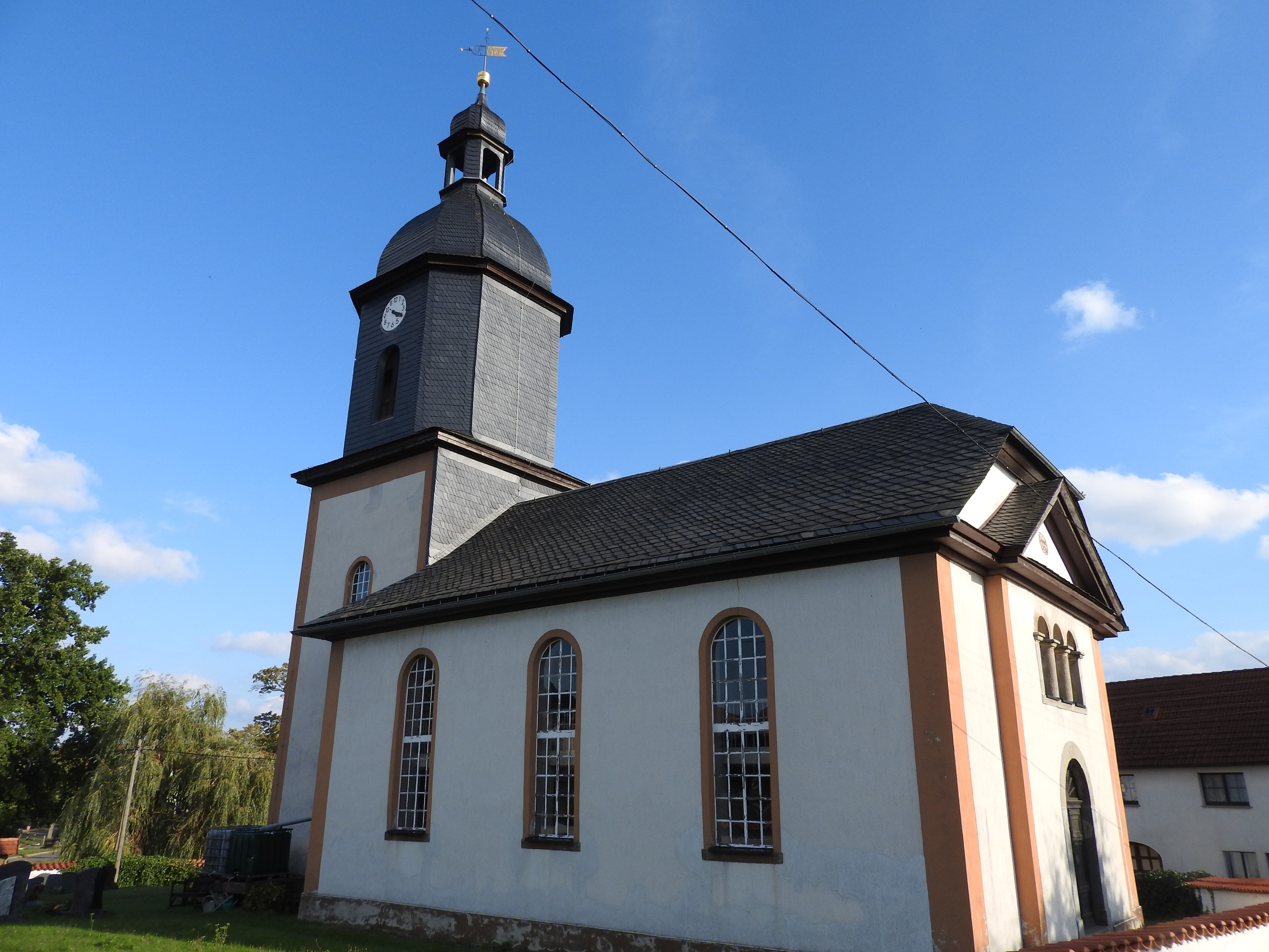 Kirche in Köthnitz, Thüringen